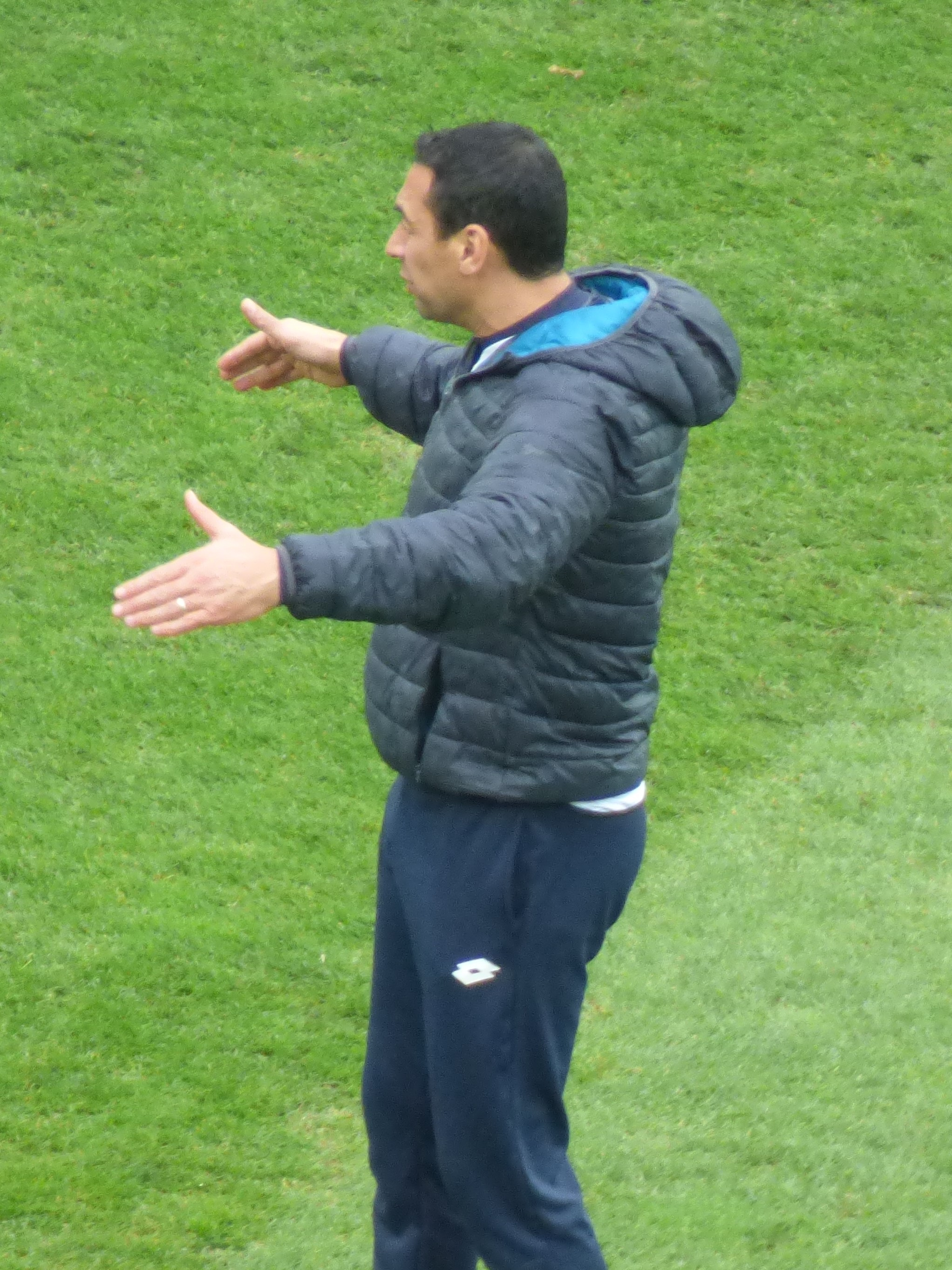 Ali Boumnijel avant le match RC Lens / FC Sochaux, comptant pour la quinzième journée du championnat de France de Ligue 2 de football 2019-2020, le 23 novembre 2019, au Stade Bollaert-Delelis.